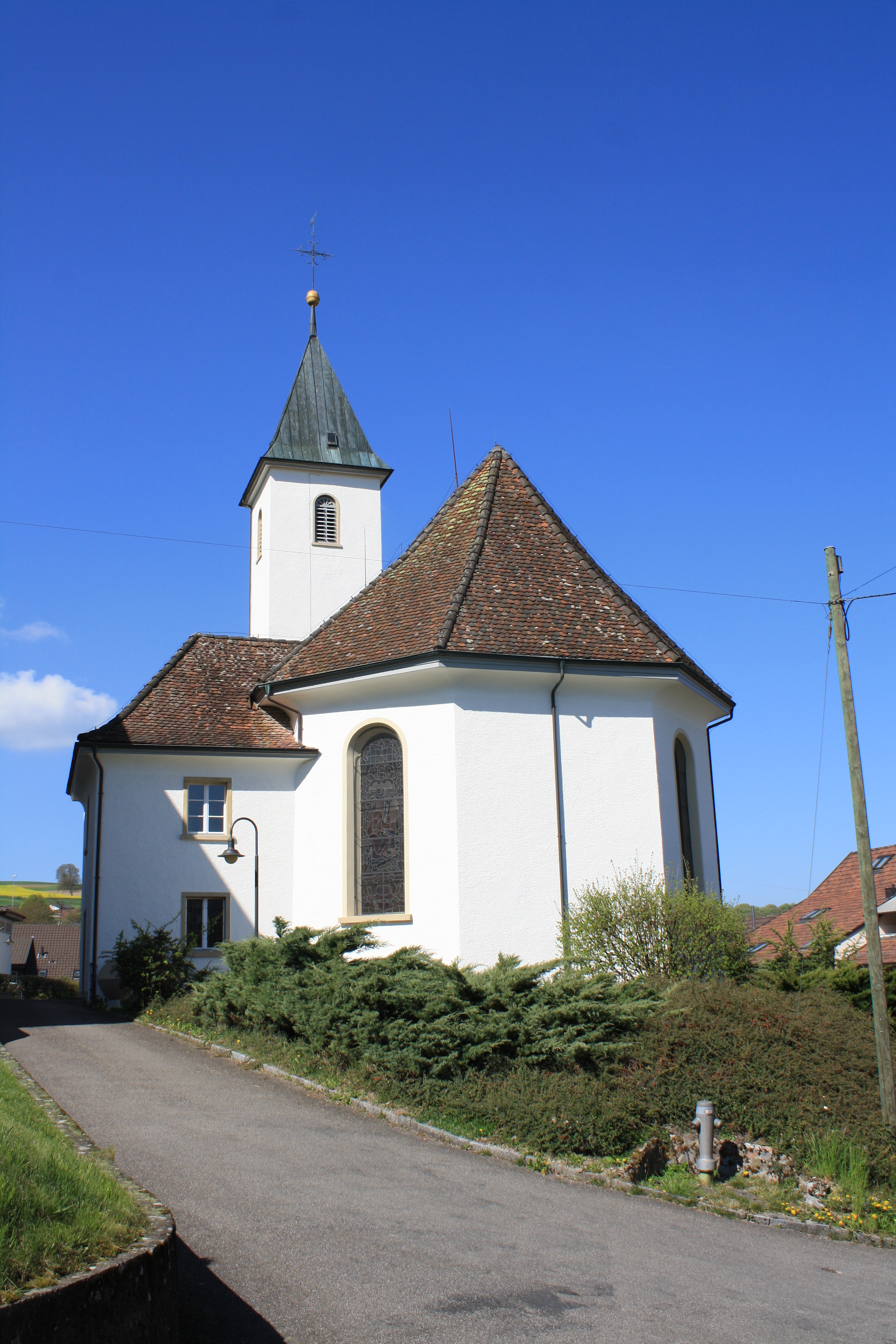 Kirche von Schupfart